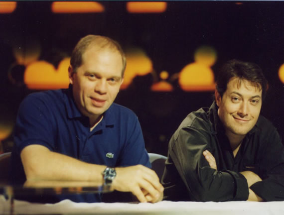 Foto di Marco Marzocca insieme a Corrado Guzzanti